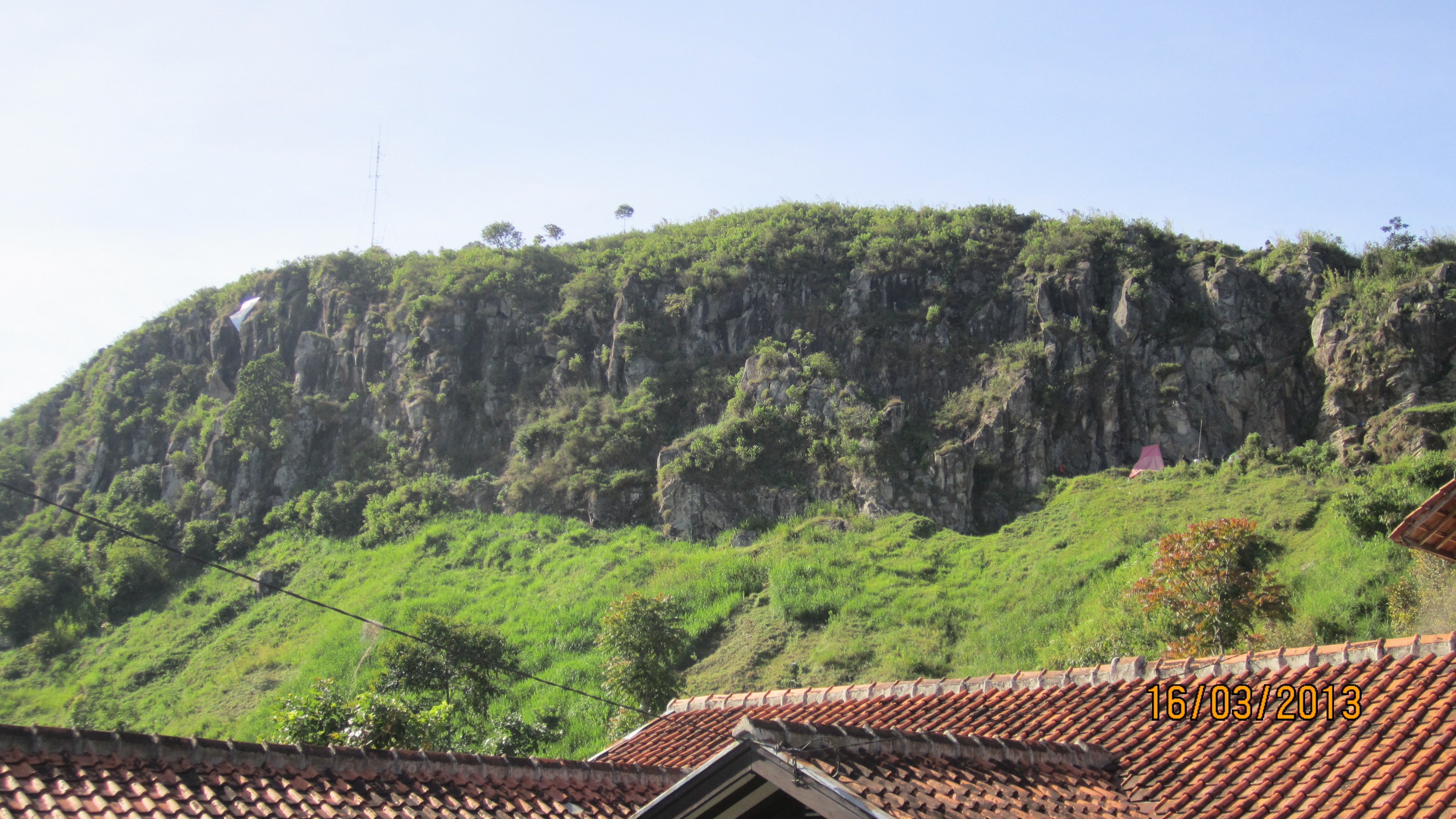 Basa Sunda: Potret taun 2013, nalika panalungtikan mata pelajaran Geografi, ngeunaan Patahan Lembang.